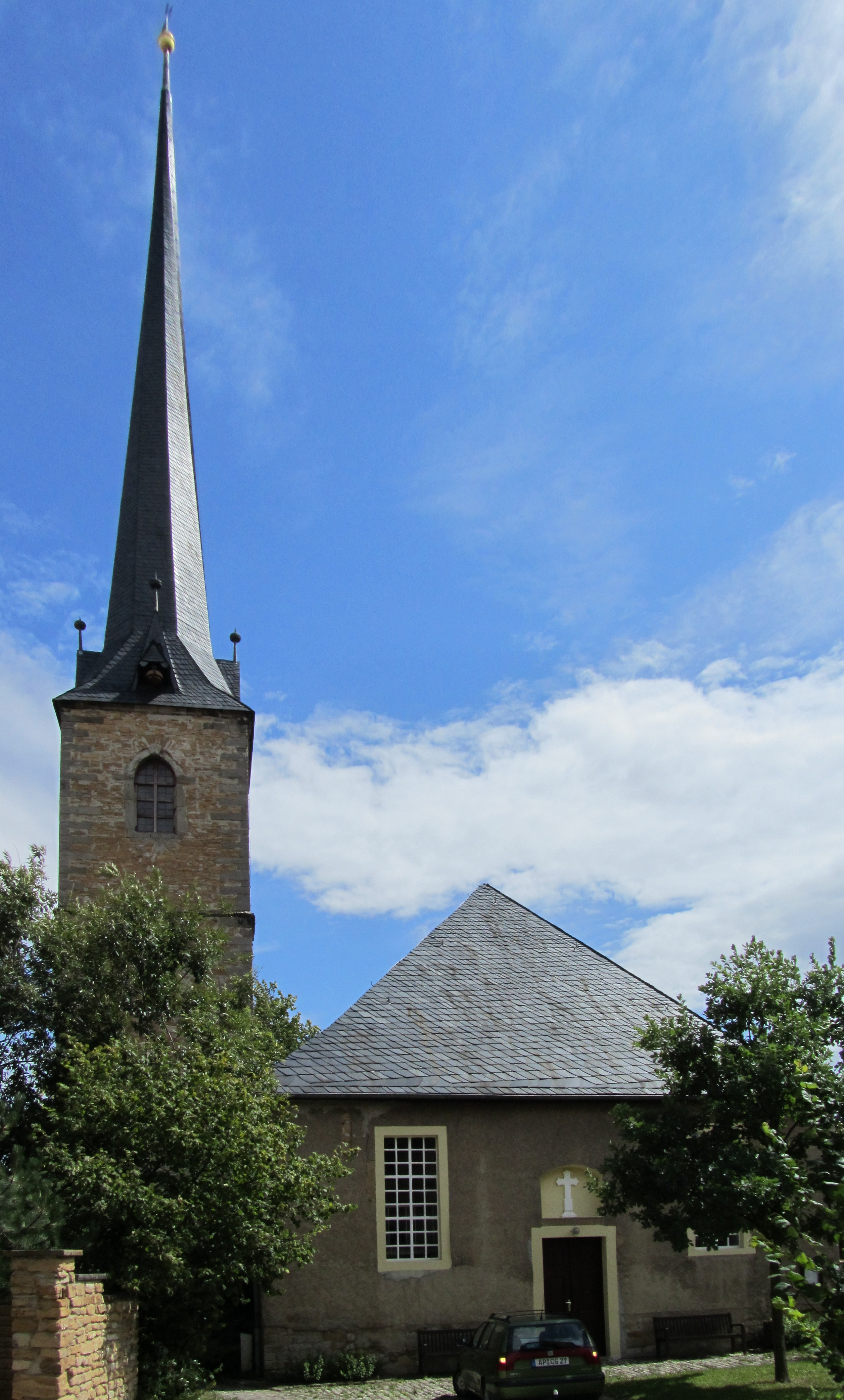 Die Kirche von Neumark bei Weimar (Thüringen).